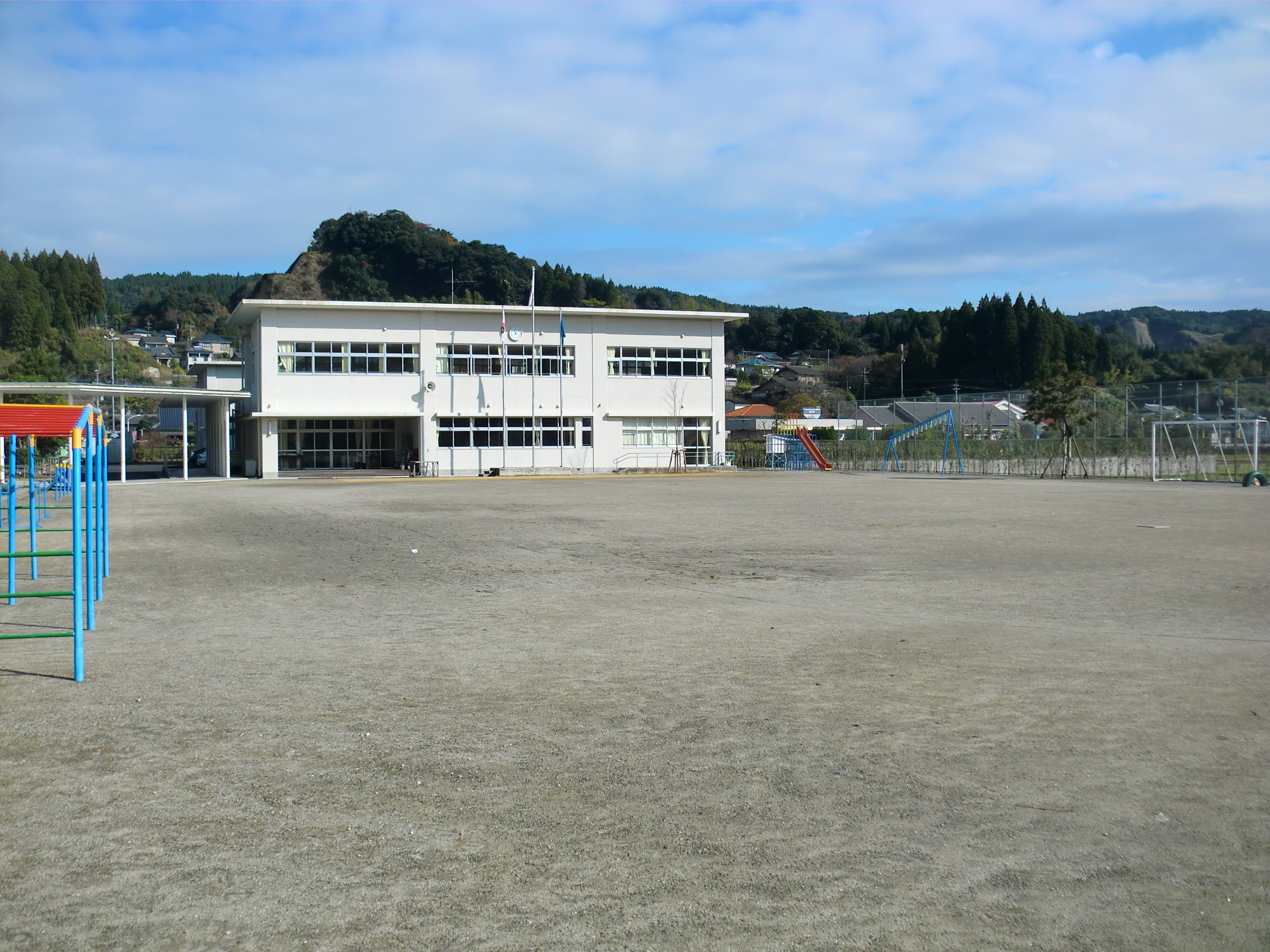 鹿児島市にある吉田（よしだ）小学校